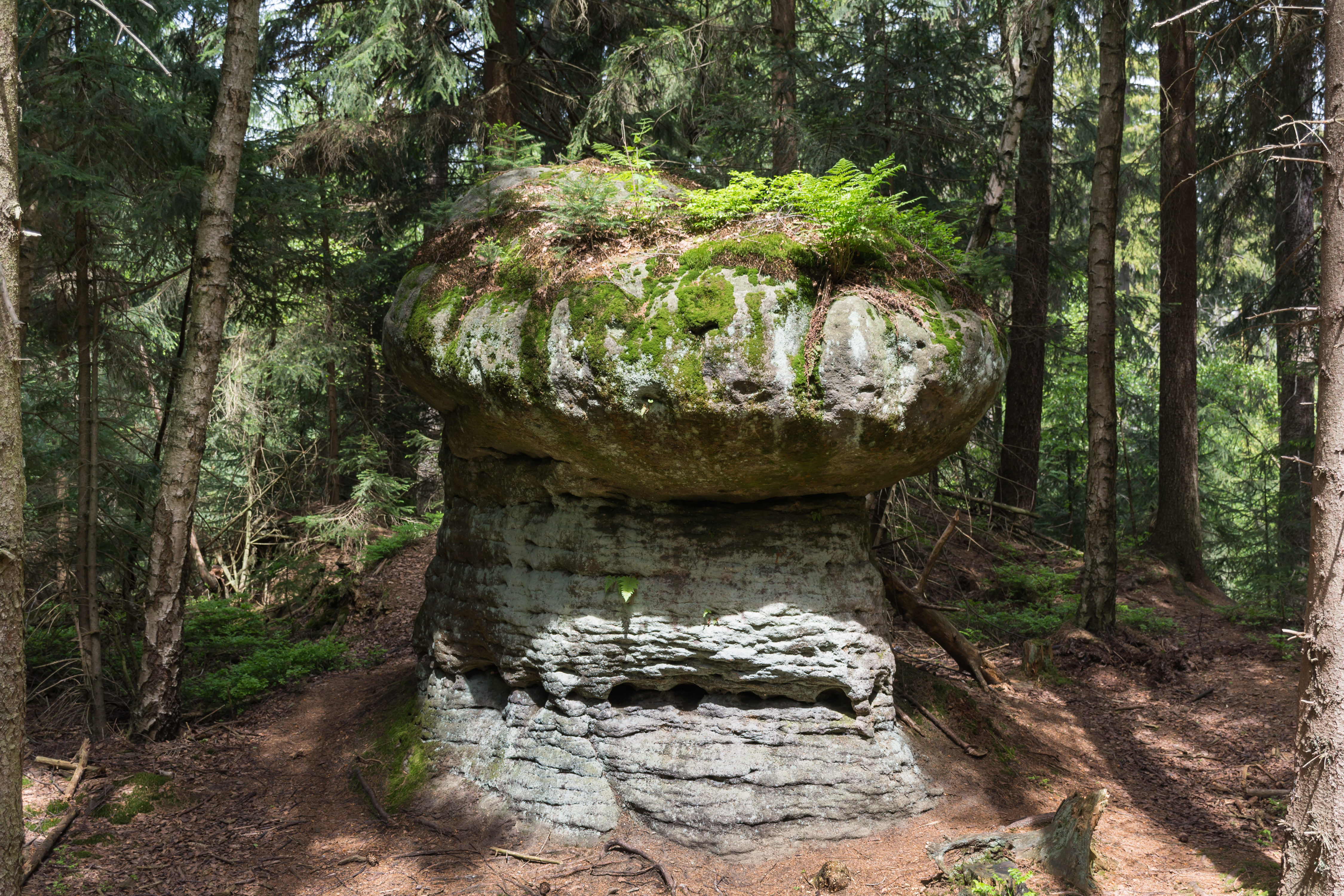 Obszar specjalnej ochrony ptaków Góry Stołowe. This is a photography of Natura 2000 protected area with ID PLB020006